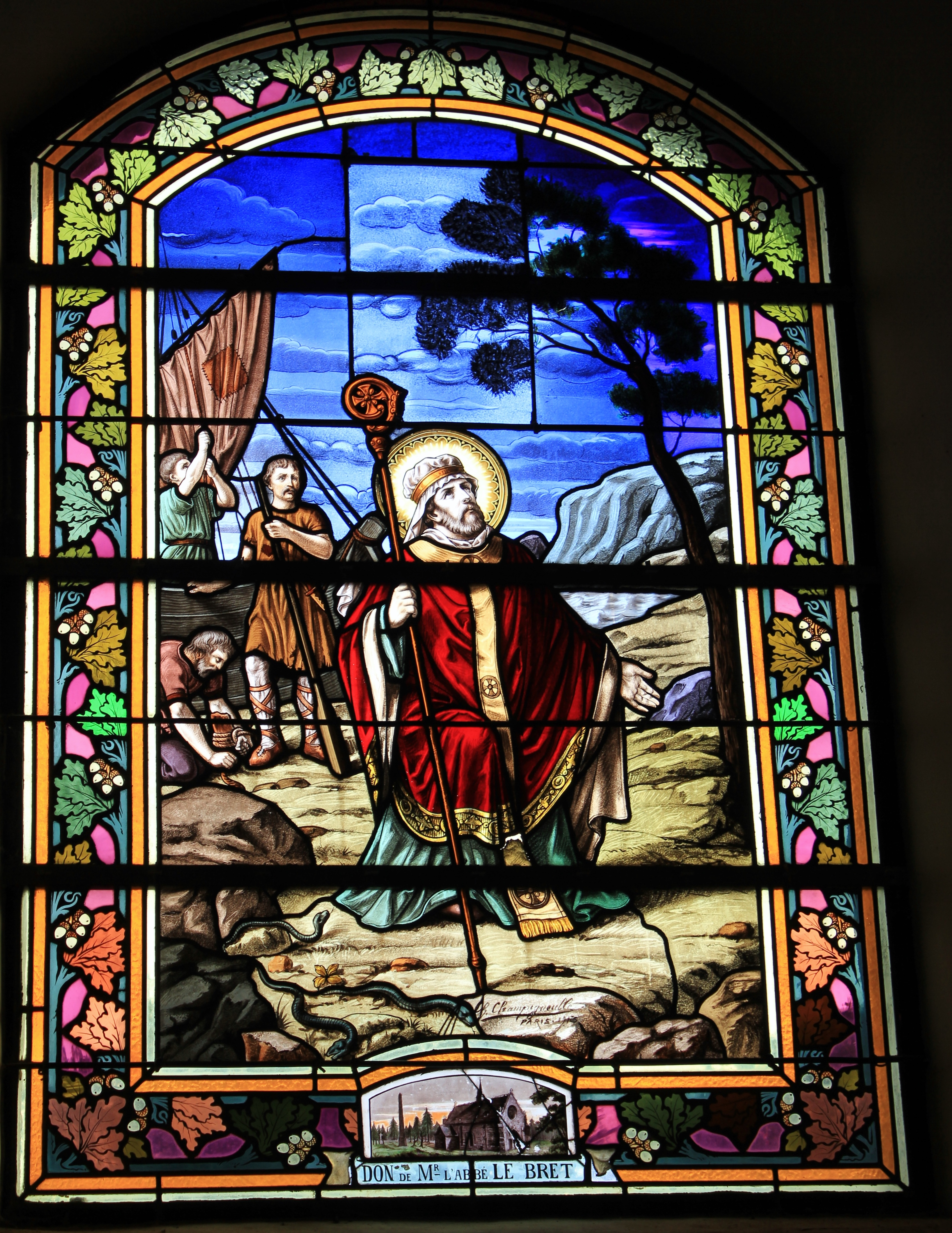 Église Sainte-Croix (La Croix-Helléan) : vitrail ( Saint-Maudez)